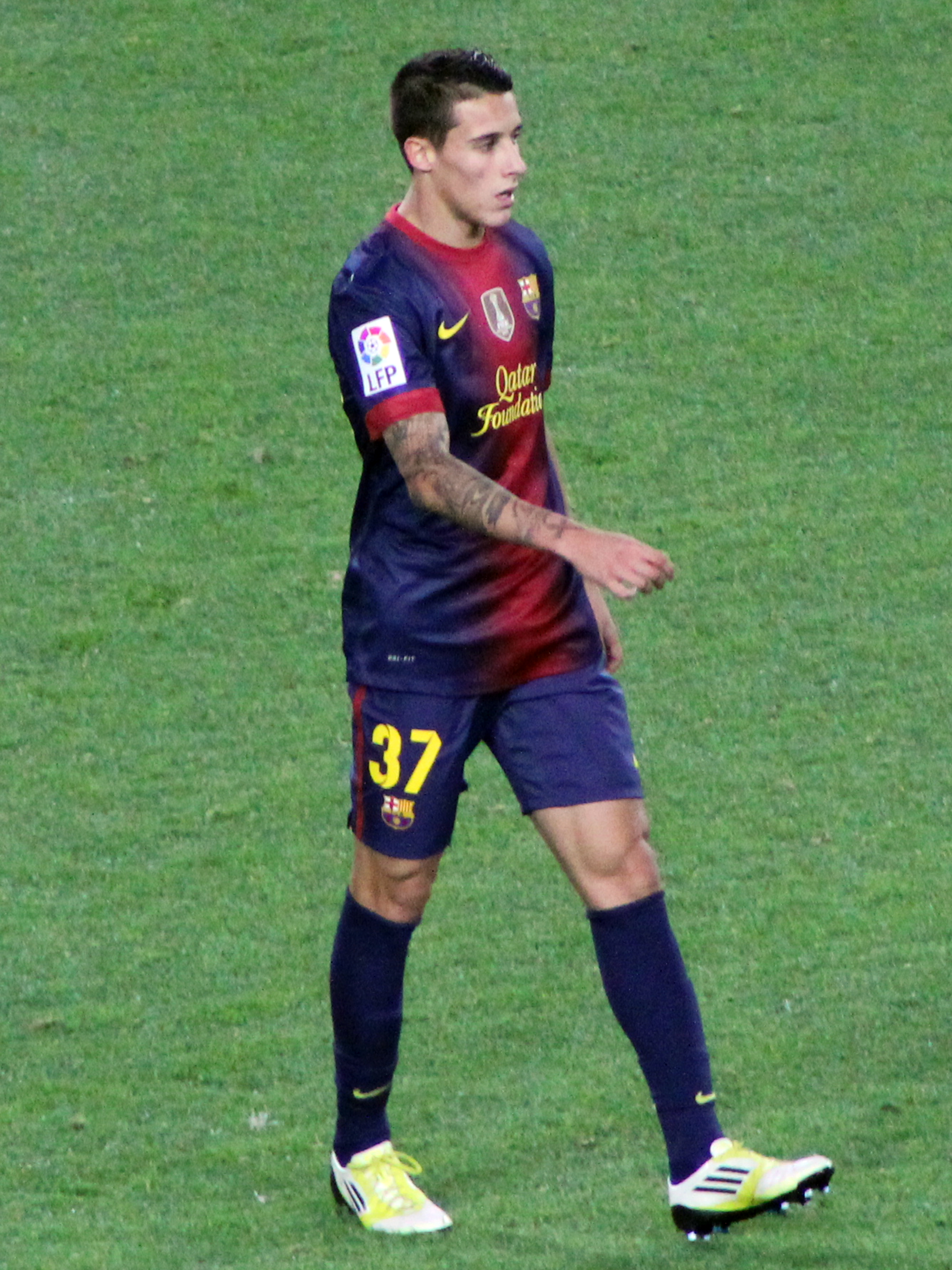 Cristian Tello con la camiseta del FC Barcelona, en un partido de dieciseisavos de Copa del Rey contra el Alavés, en el Camp Nou.